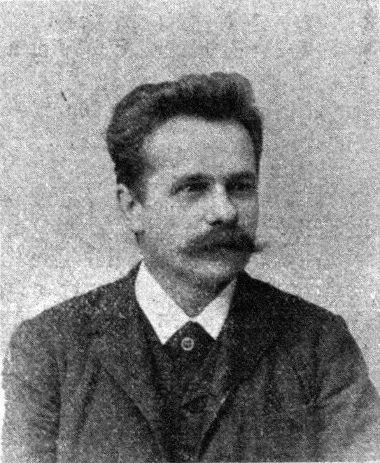 Österreichischer Politiker, Reichsratswahl 1907, Name siehe Dateiname